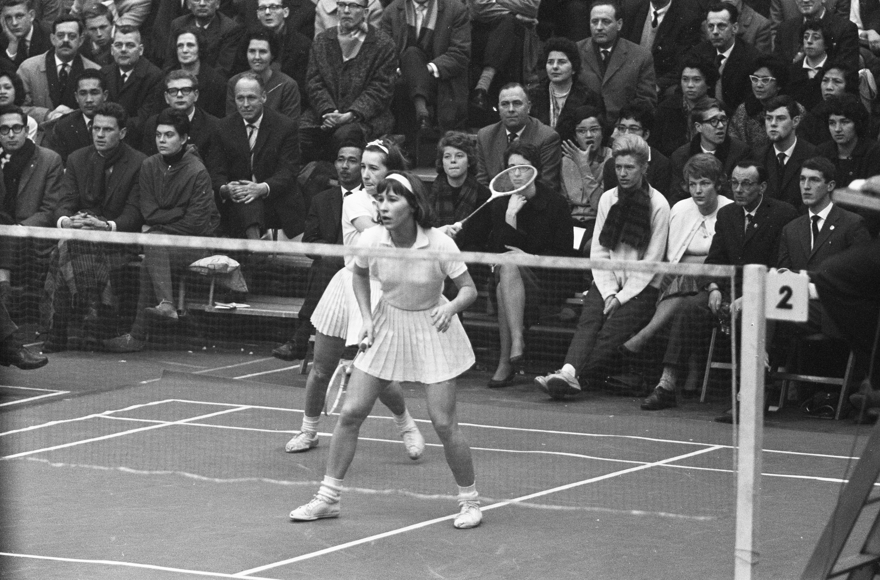 Collectie / Archief : Fotocollectie Anefo Reportage / Serie : [ onbekend ] Beschrijving : Internationale Badmintonkampioenschappen te Haarlem. De dames dubbel Flindt in aktie Datum : 10 februari 1963 Locatie : Haarlem Trefwoorden : AKTIES, Badminton, kampioenschappen Fotograaf : Pot, Harry / Anefo Auteursrechthebbende : Nationaal Archief Materiaalsoort : Negatief (zwart/wit) Nummer archiefinventaris : bekijk toegang 2.24.01.05 Bestanddeelnummer : 914-8065